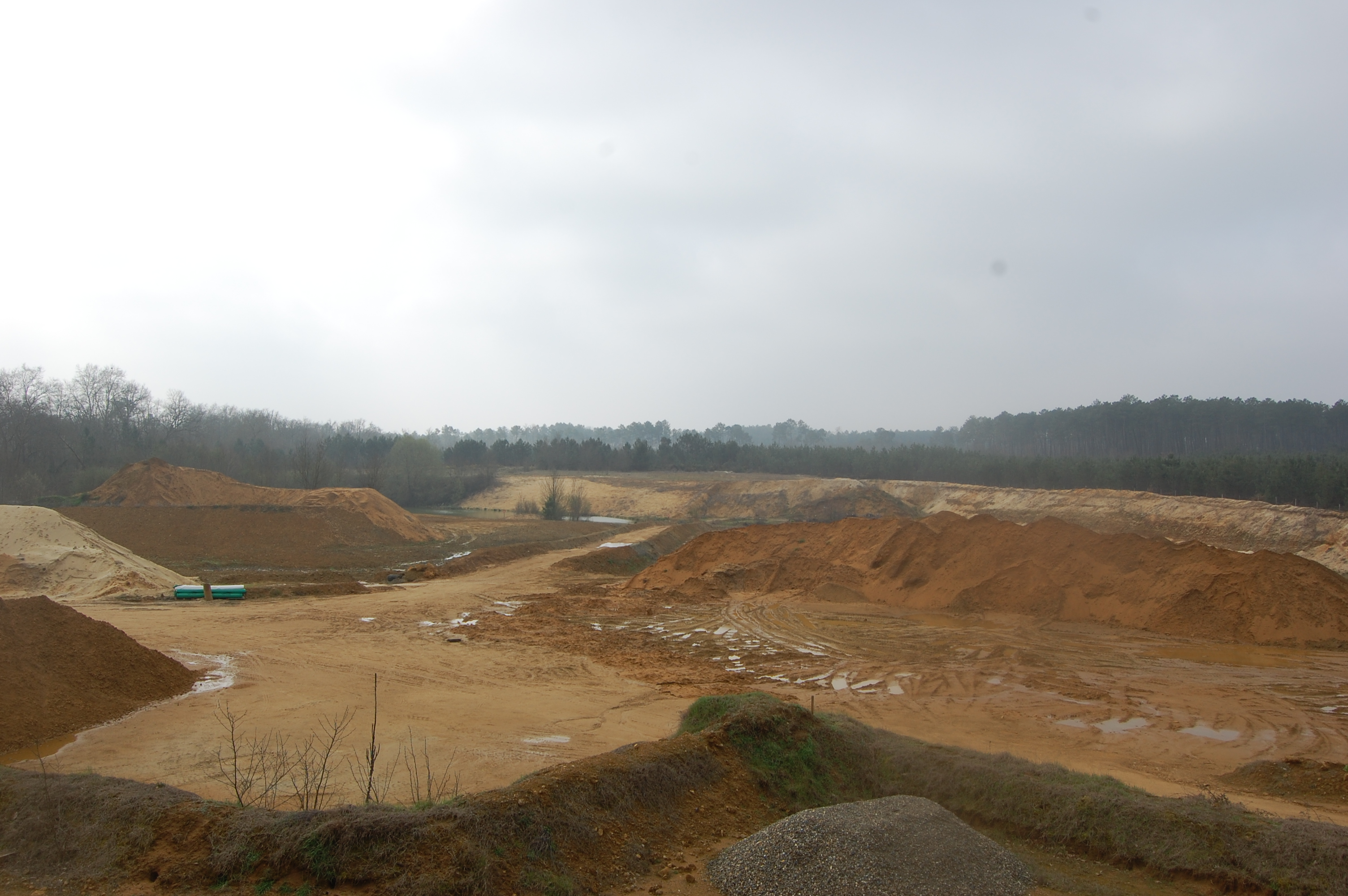 La carrière de Brocas : vue générale.